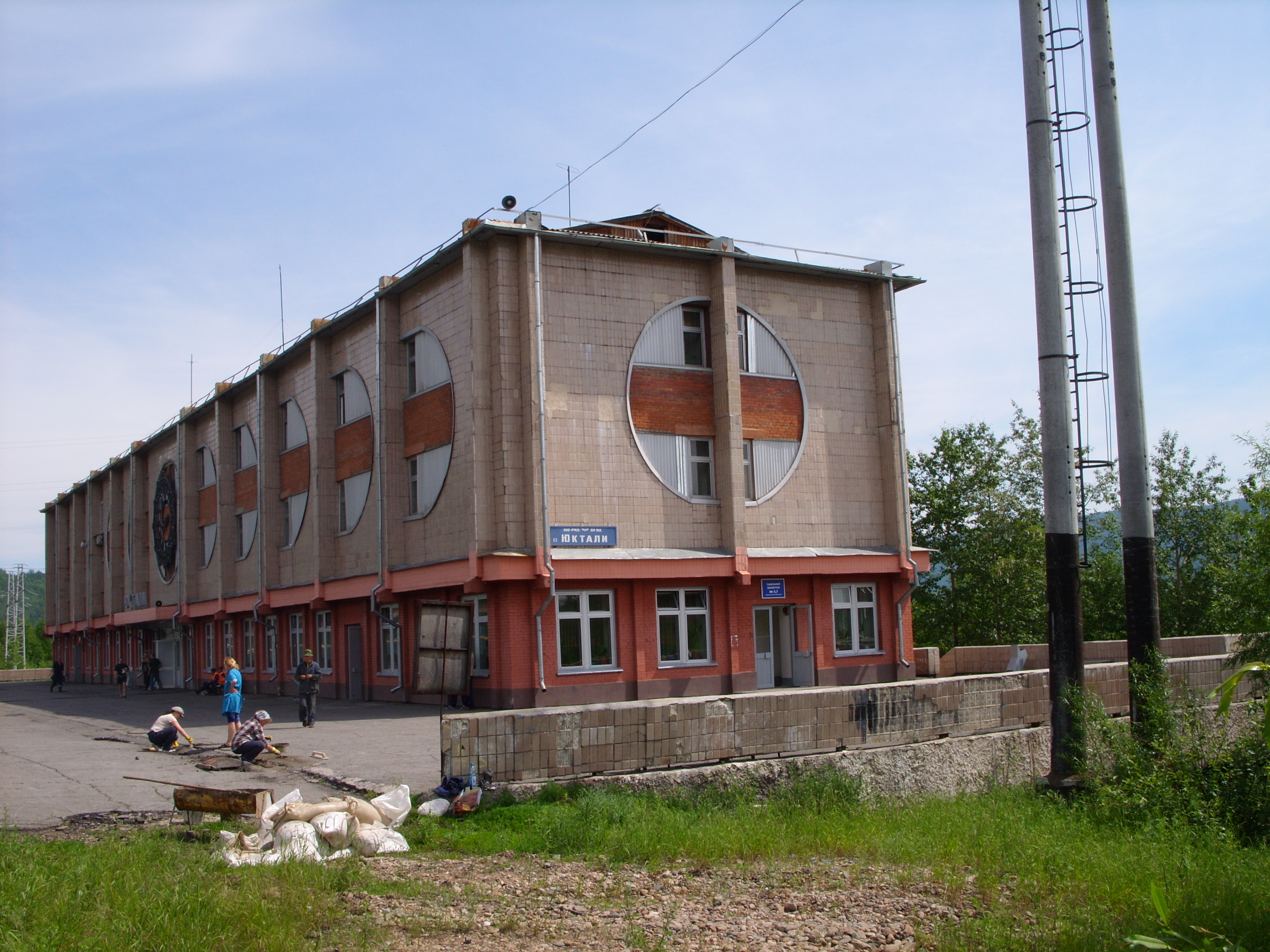 Амурская область, Россия